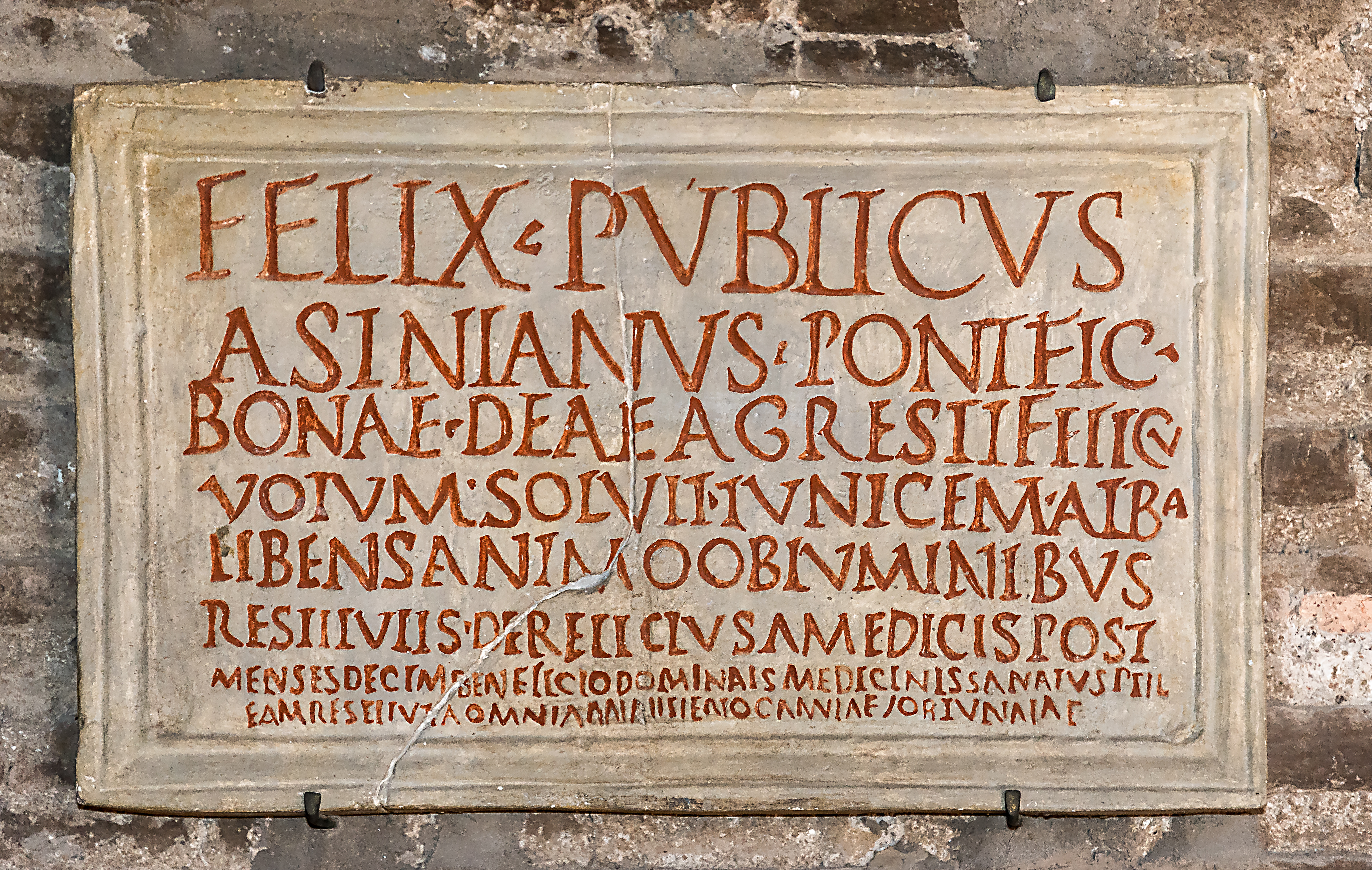 Widmungsinschrift des Staatssklaven Felix Asinianus an die Gute Göttin (Bona Dea) nach der Genesung einer schweren Augenkrankheit. Die Tafel ist im Museum Via Ostiense, Porta San Paolo in Rom ausgestellt.